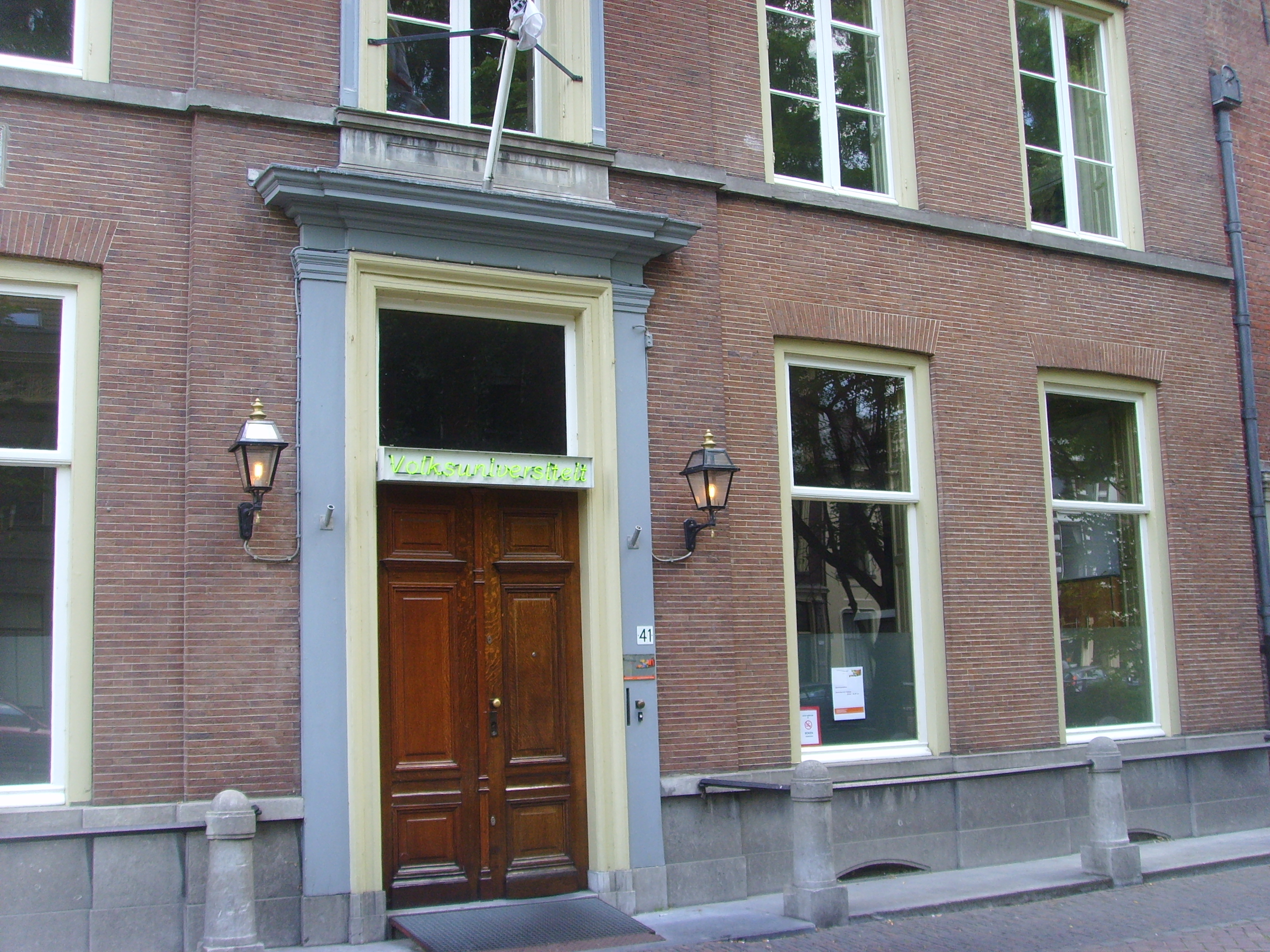 De Volksuniversiteit aan de Nieuwegracht 41 in Utrecht. 88″ N, 5° 07′ 28.01″ E